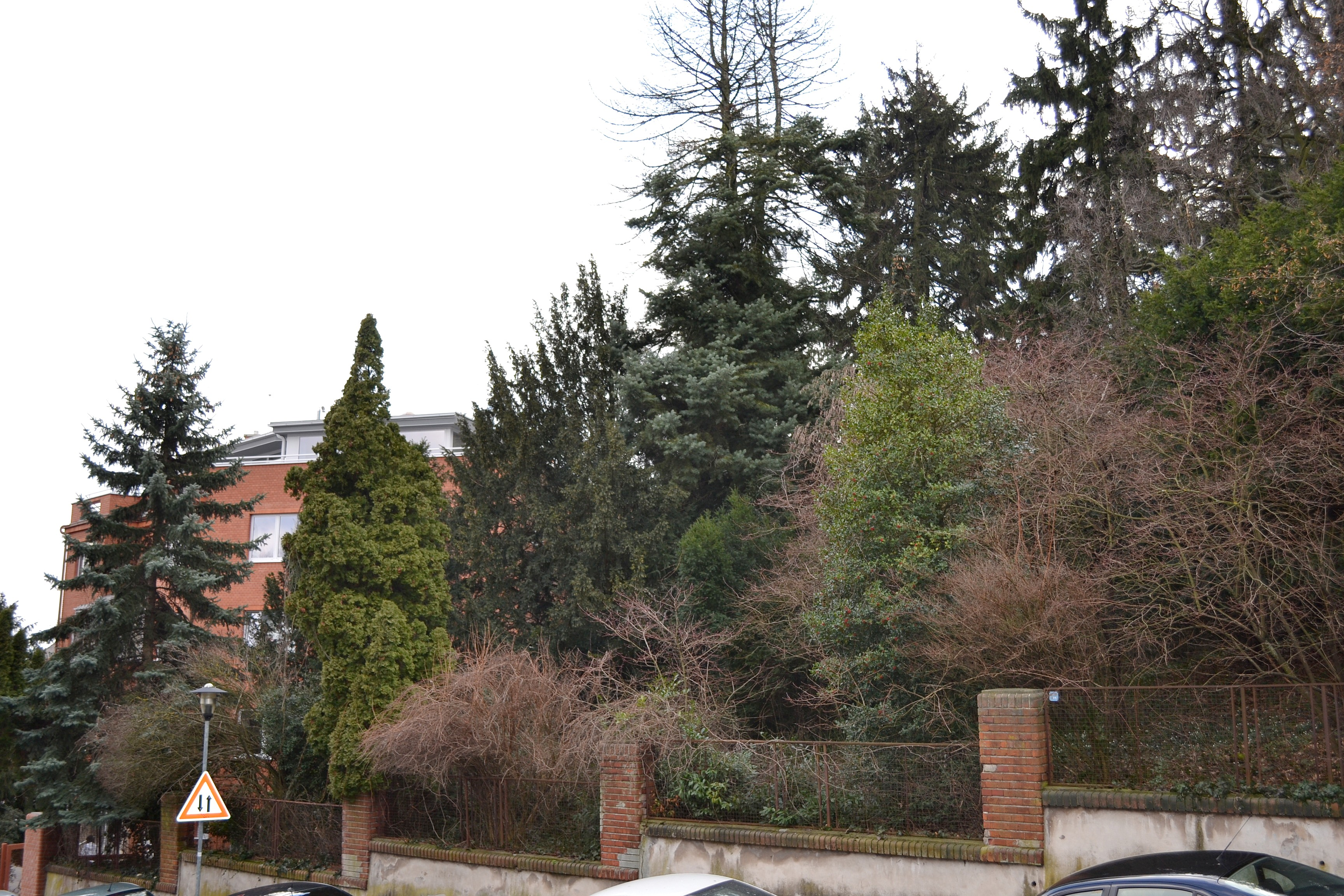 Kochova záhrada. V pozadí budova býv. Kochovho sanatória